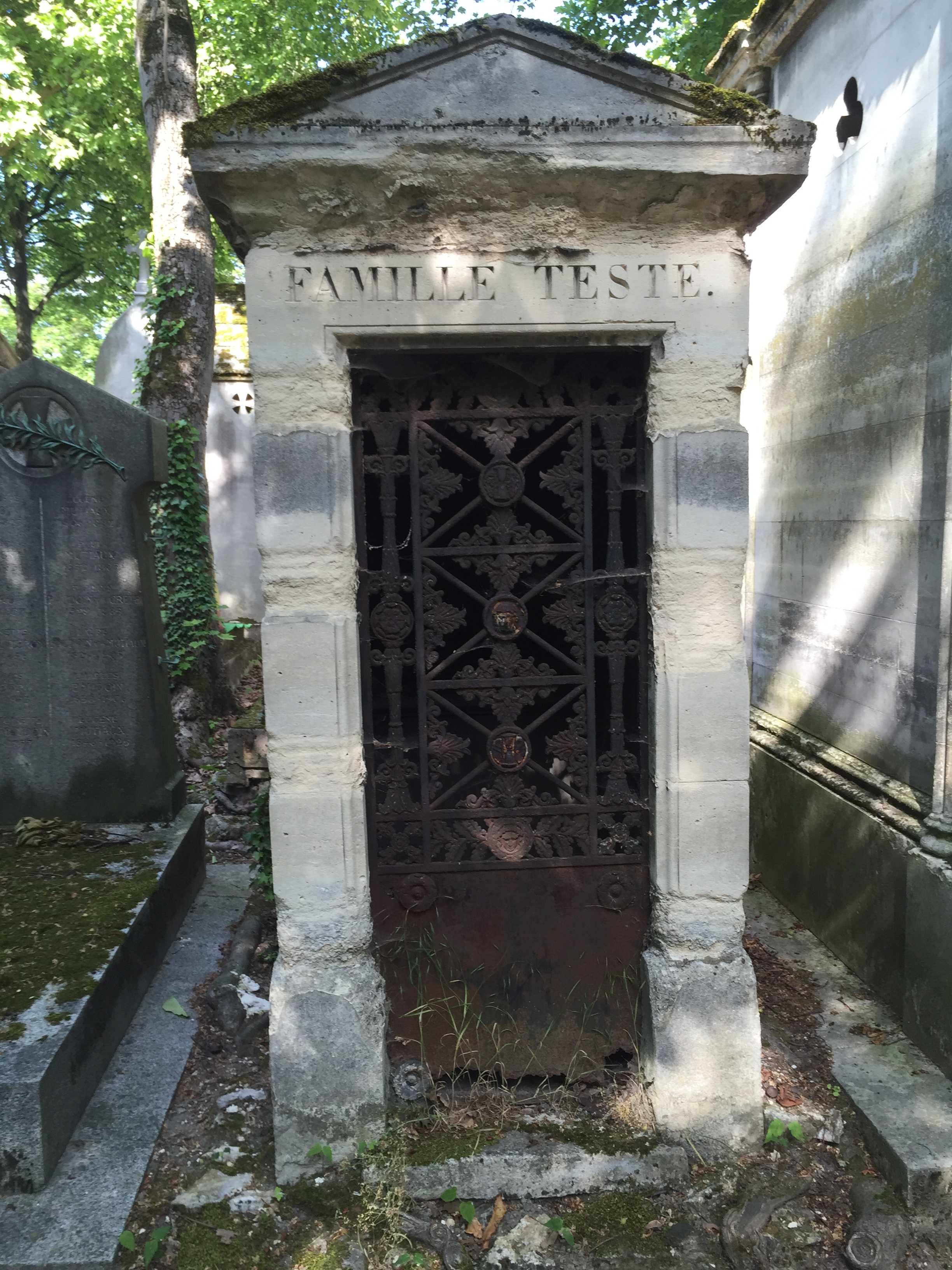 Tombe de Jean-Baptiste Teste au Père-Lachaise